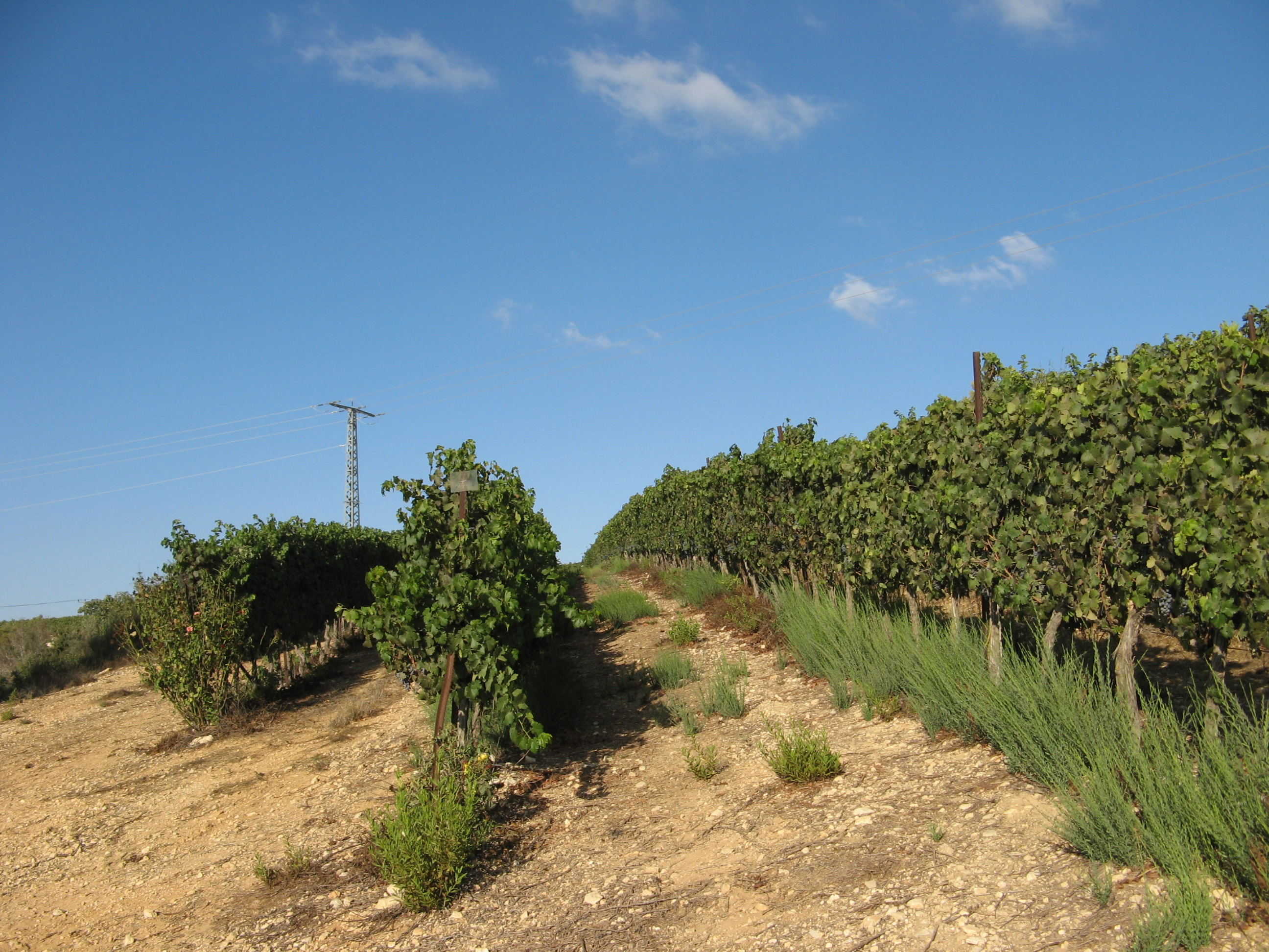 כרמים ליד צובה